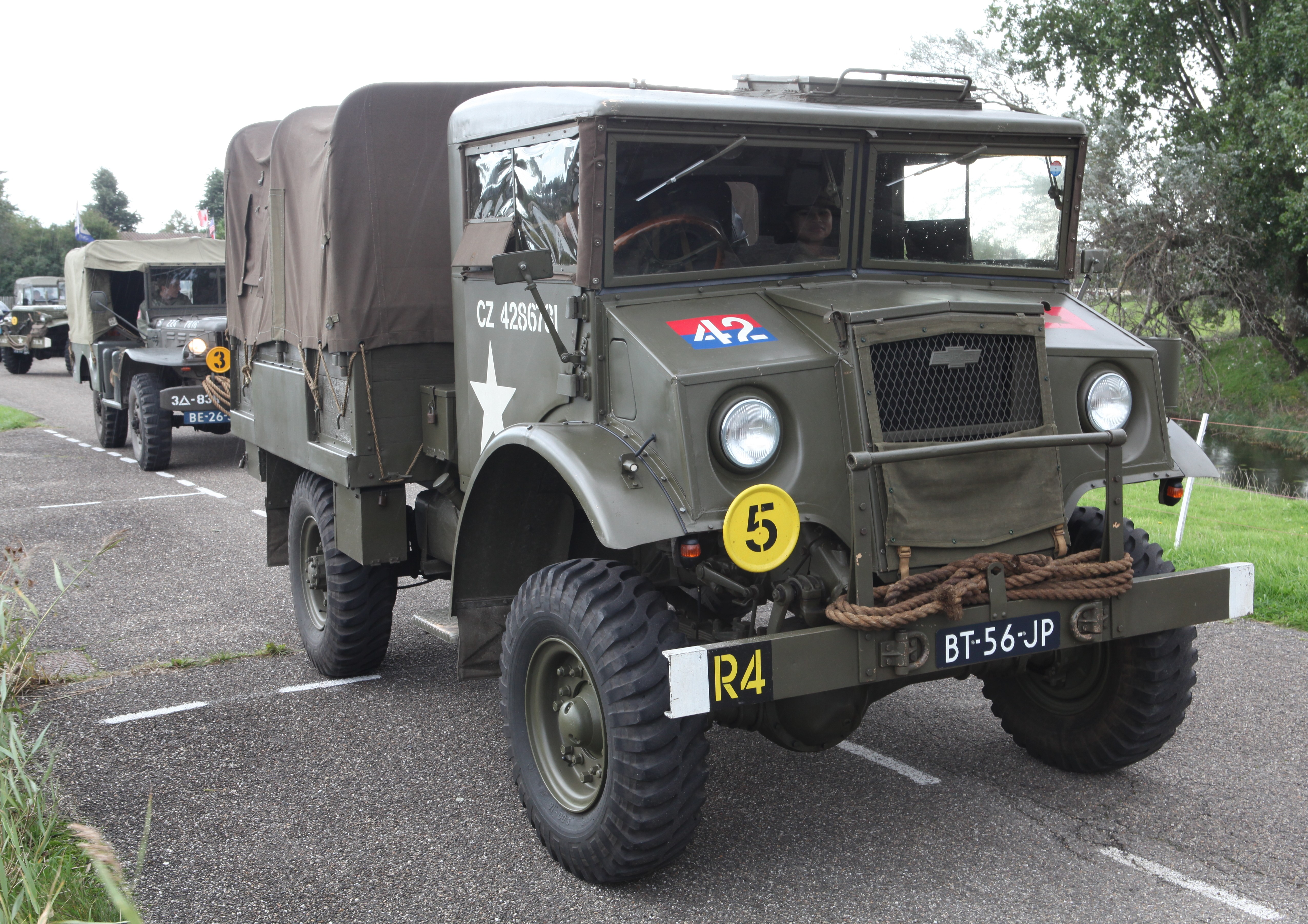 Chervrolet C 15